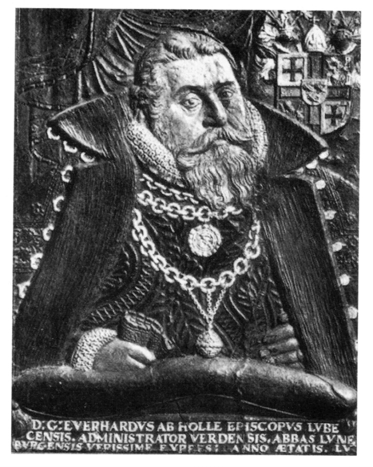 Eberhard von Holle (* 1531; † 1586), Bishop of Lübeck